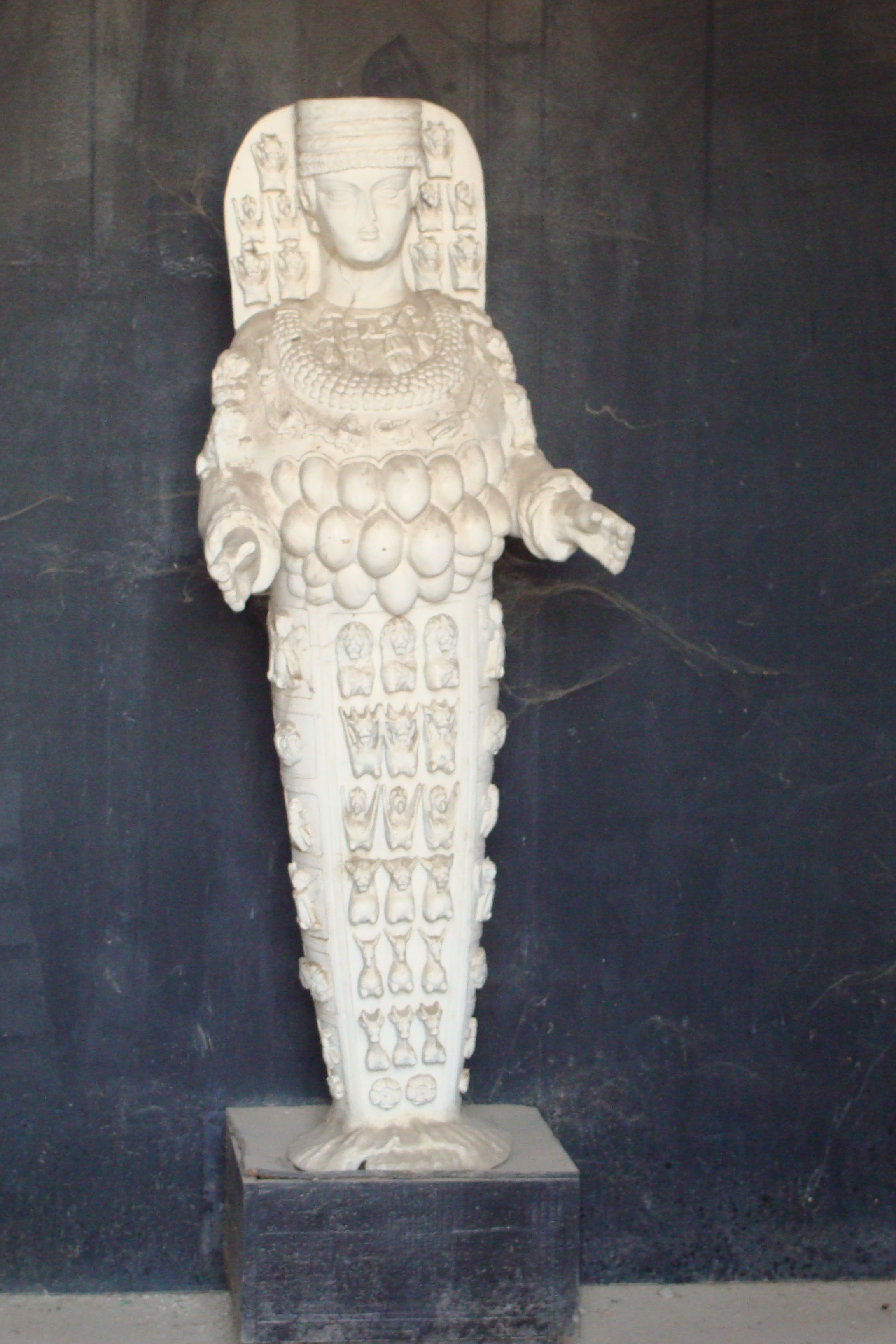 Artemis. Ruiny antycznego miasta Efez.